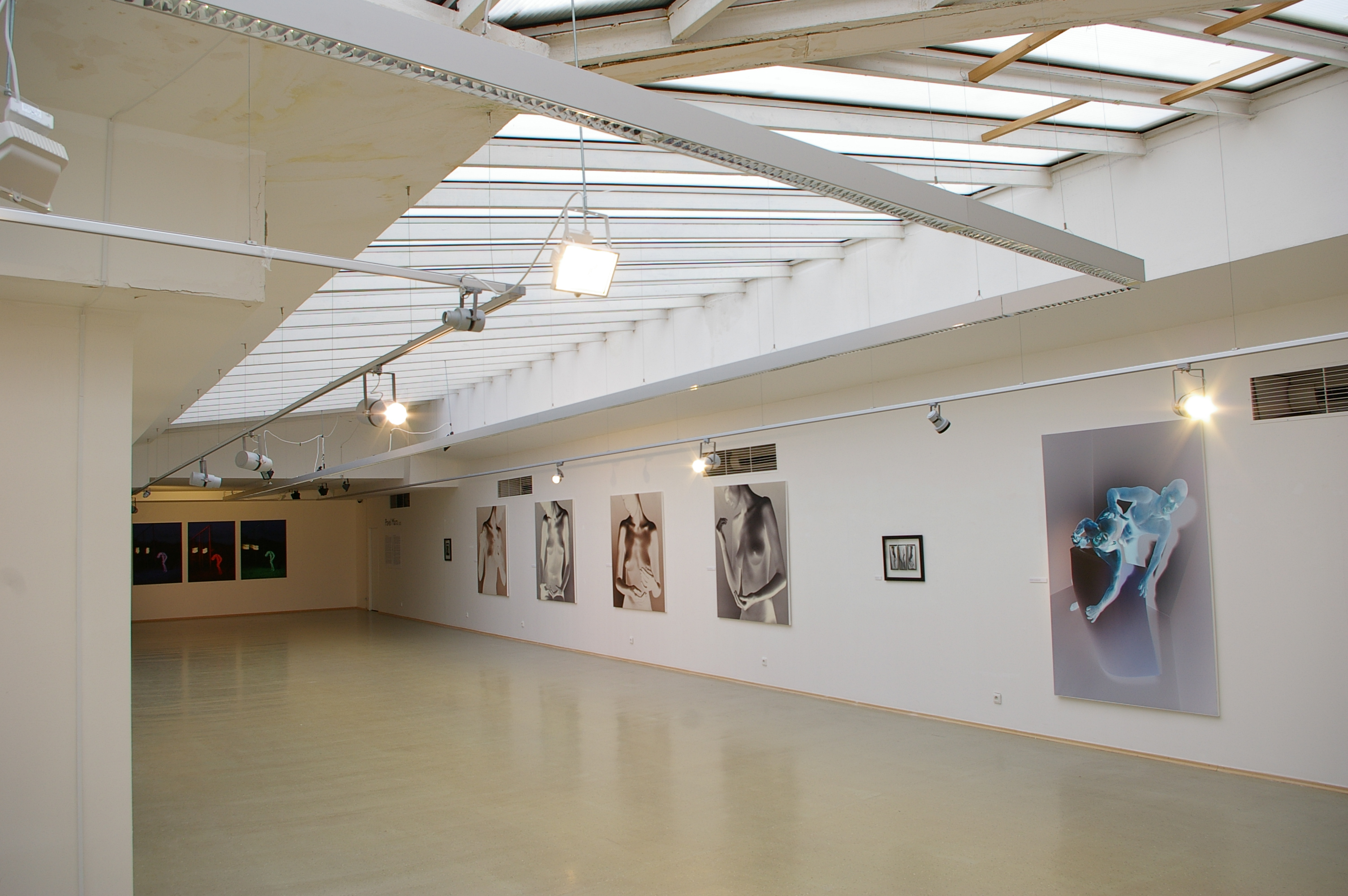 Mesiac fotografie Bratislava 2013 Výstava